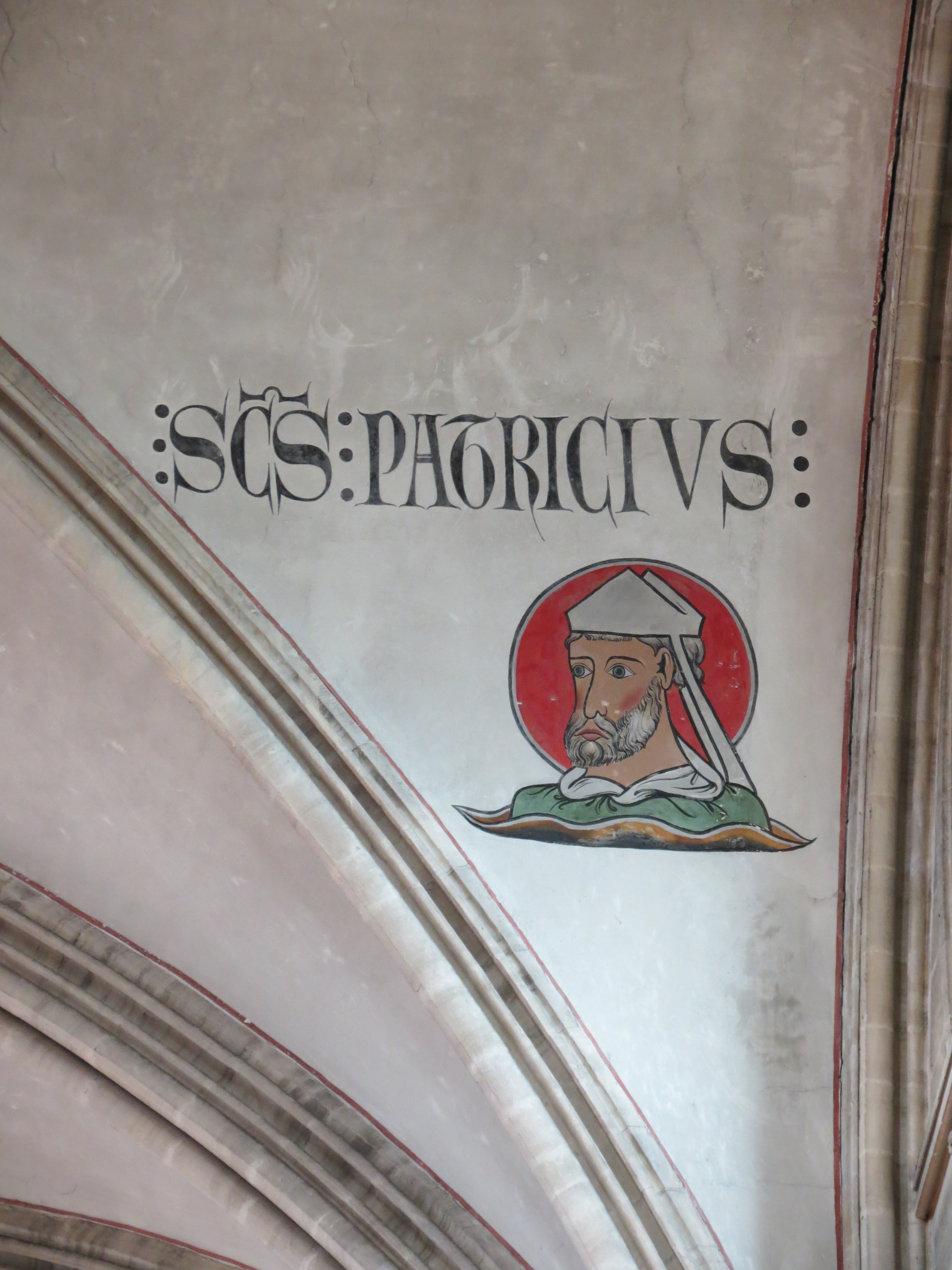 Peinture de Saint-Patrice sur une des voûtes du chœur de la cathédrale de Bayeux.